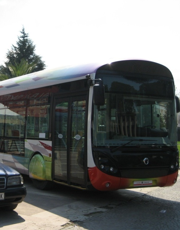 Buslinie in Tirana